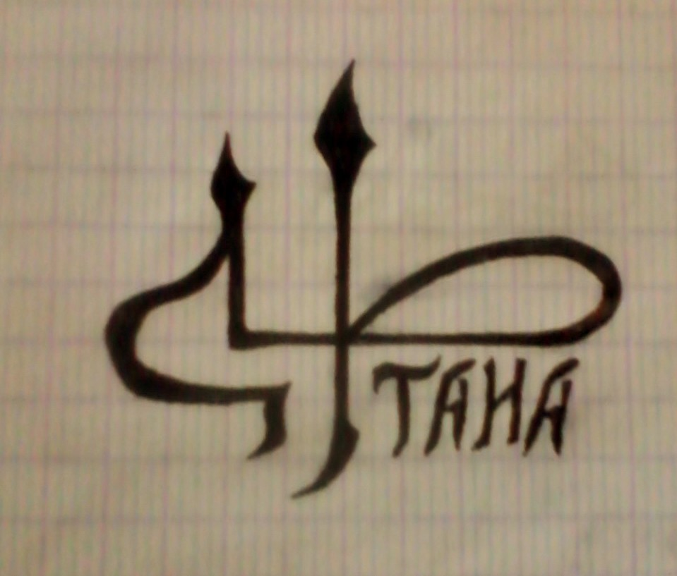 إسم طه مرسوم